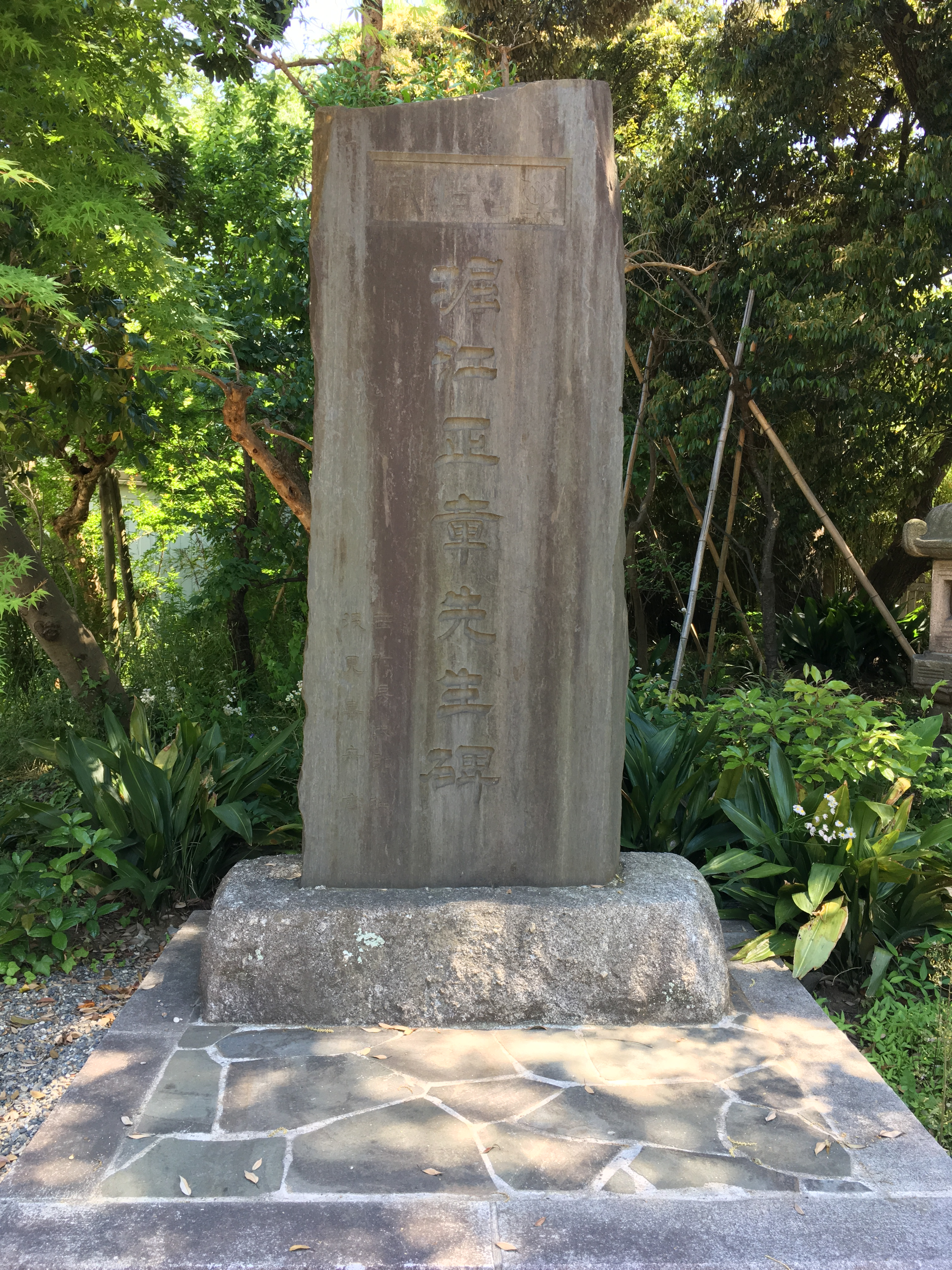 高徳寺（千葉市中央区）境内にある堀江正章先生の碑